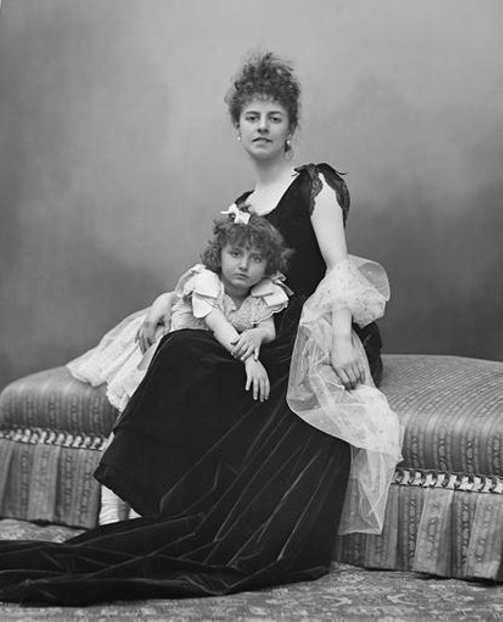 La comtesse Élisabeth de Riquet de Caraman, née Marie Joséphine Anatole Louise Élisabeth de Riquet de Caraman-Chimay, est l'épouse du comte Henry Greffulhe (1848-1932). Elle est née à Paris, le 11 juillet 1860 et décédée à Genève (Suisse), le 21 août 1952. La comtesse Élisabeth Greffulhe est représentée ici avec sa fille unique, Élaine, âgée de 4 ans.